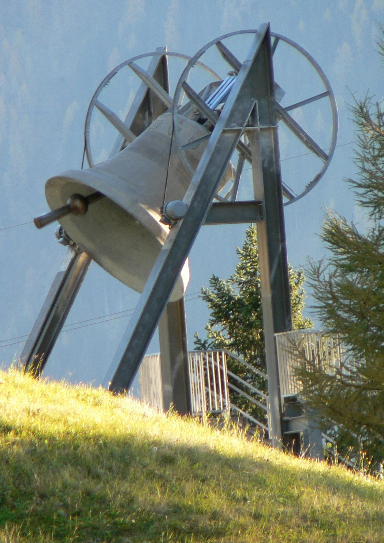 Friedensglocke des Alpenraumes. Die Glocke schlug in dem Moment der Aufnahme (ich denke das erkennt man) This media shows the remarkable cultural object in the Austrian state of Tyrol listed by the Tyrolean Art Cadastre with the ID 51952. Object location47° 18′ 36.72″ N, 11° 08′ 35.34″ E